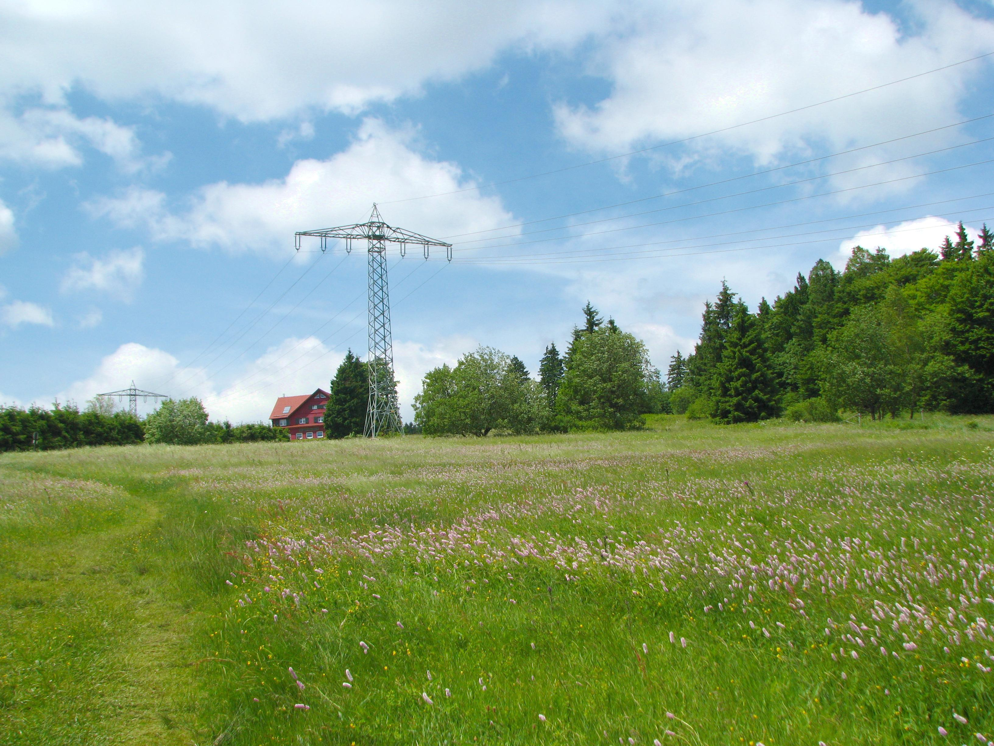 Ebertswiese mit Berghotel und Stromleitung. Im Vordergrund Bergwiesen im Schlangenknöterich-Aspekt.